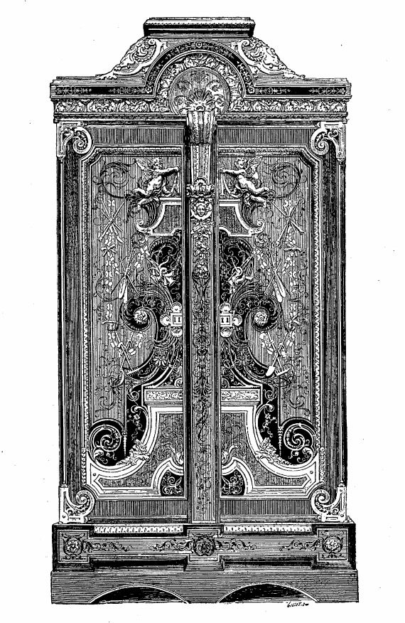 Armoire en ébène avec marqueterie d'André-Charles Boulle, époque Louis XIV (mobilier de la couronne)